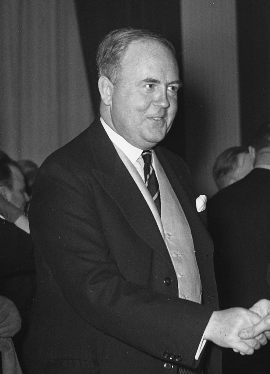 Receptie nieuwe Engelse gezant ambassadeur Mason Amsterdam